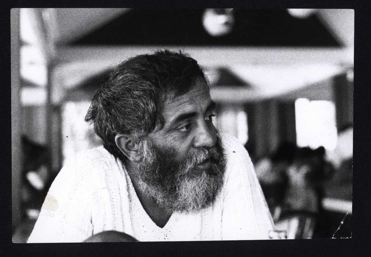 איזיקה גאון, 1987